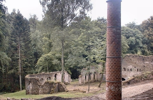 Schloss Weilerbach bei Bollendorf, Reste der Hüttenanlage